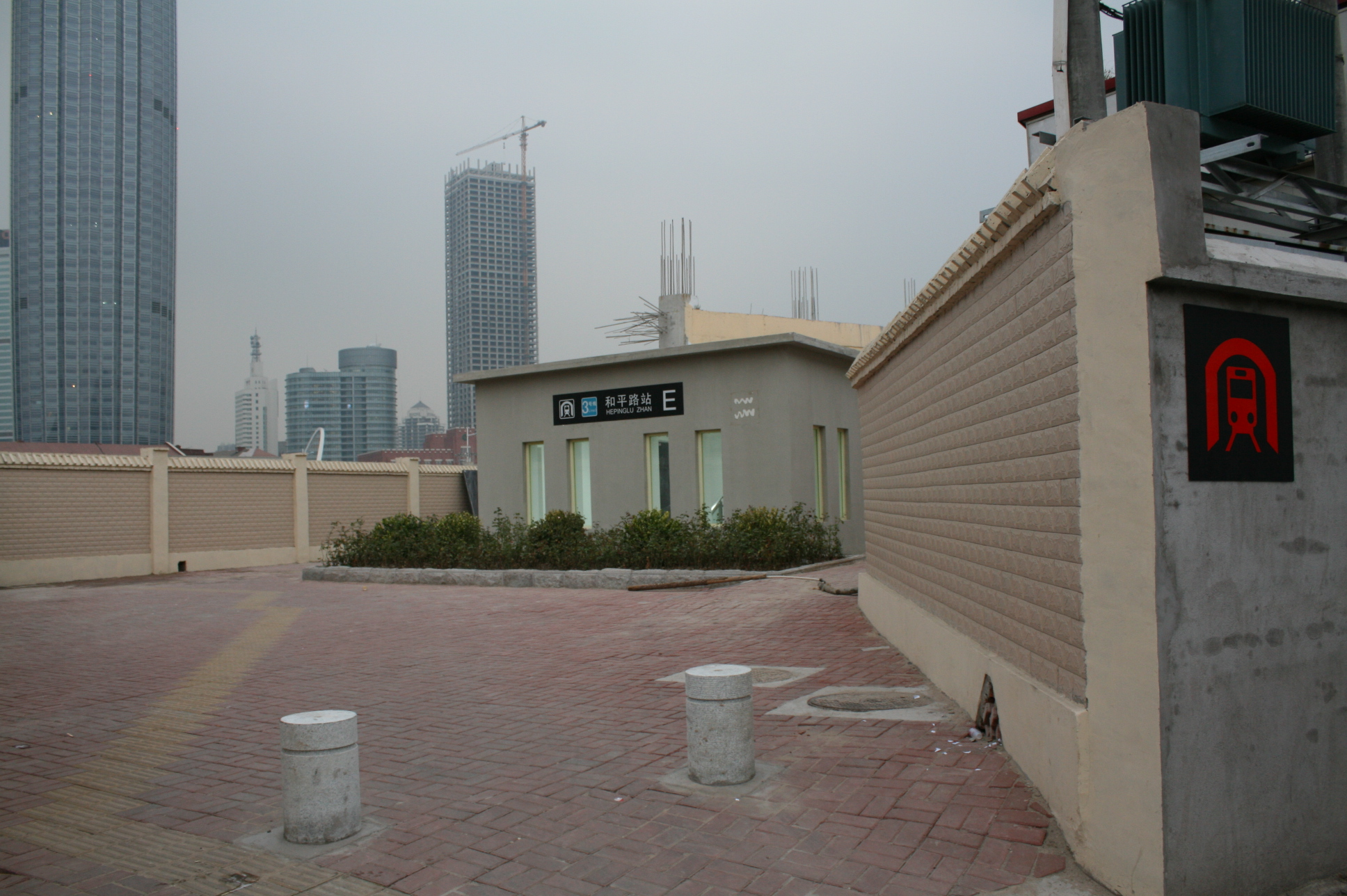 天津地鐵三號線和平路站E出口 0001